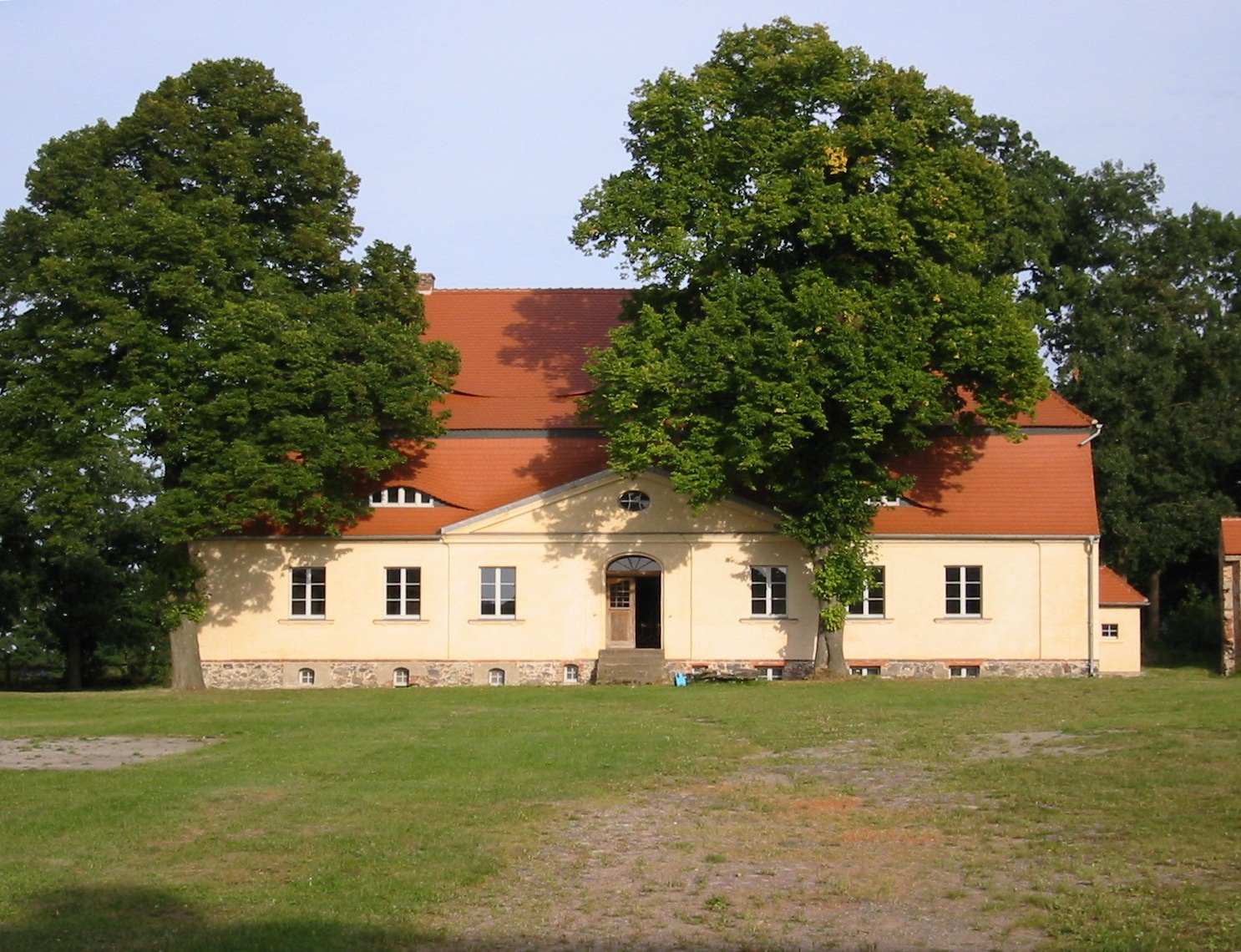 Gutshaus Welle (Vorderansicht), 2005